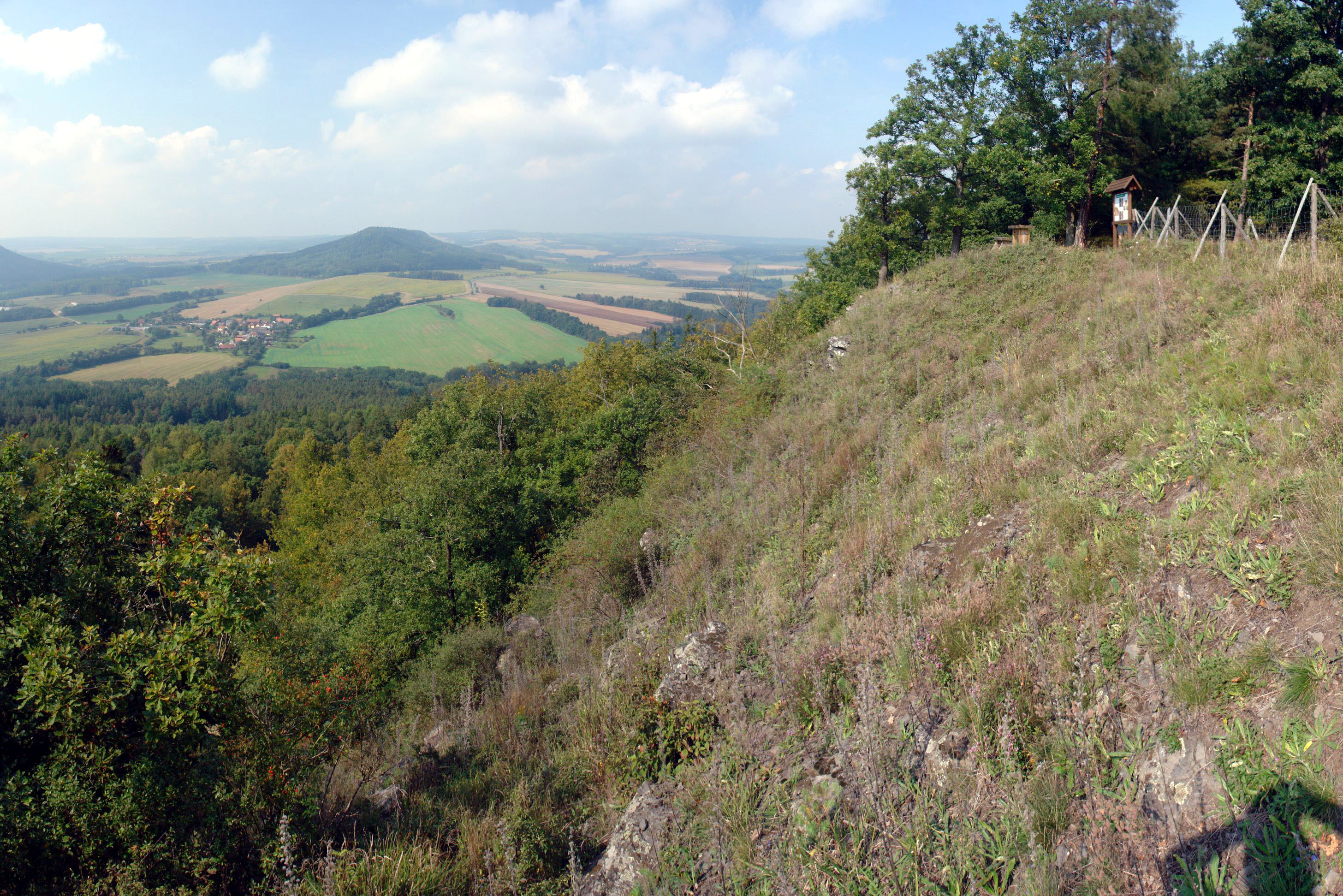 Chlum je přírodní rezervace, důvodem ochrany je udržení původního dřevinného porostu a původní květeny.